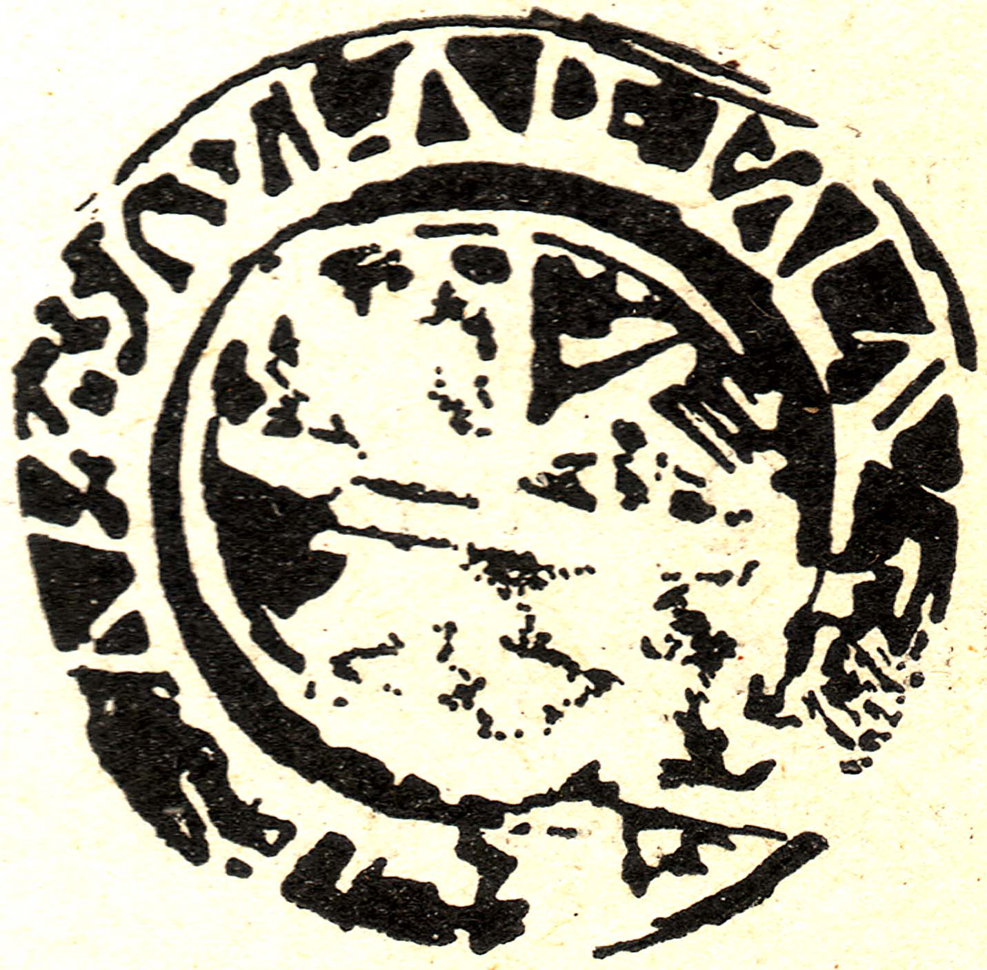 Segell municipal anterior al 1900 de Palau de Noguera (Tremp, Pallars Jussà)